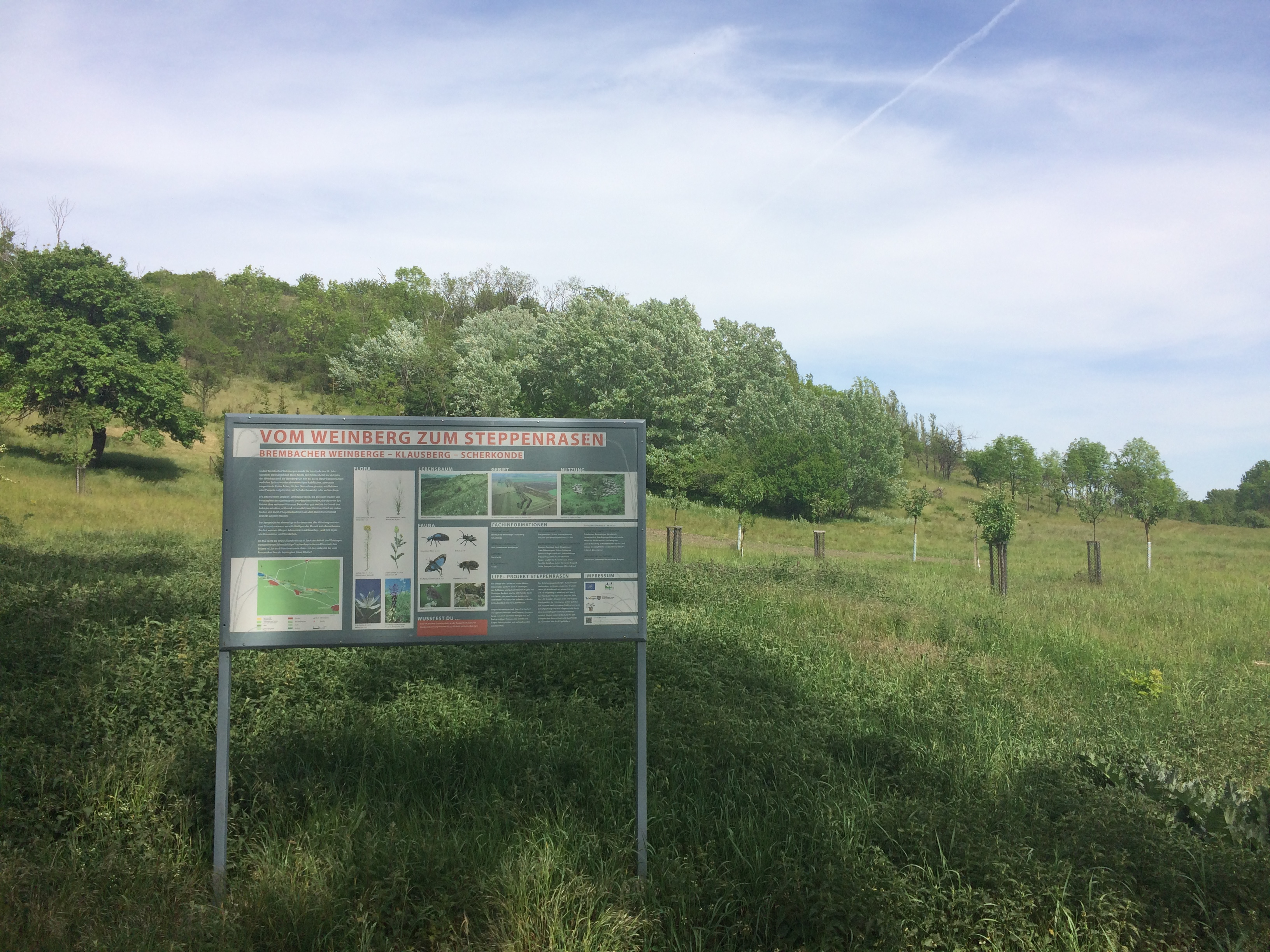 Infotafel zum Naturschutzprojekt/Naturschutzgebiet „Brembacher Weinberge“ mit Weinberg im Hintergrund; Landkreis Sömmerda (Thüringen)